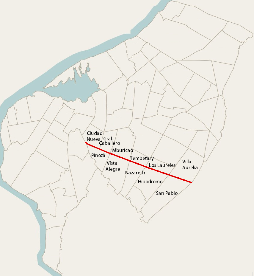 Avenida Eusebio Ayala en Asunción, Paraguay